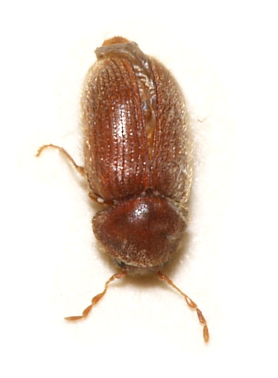 Stegobium paniceum